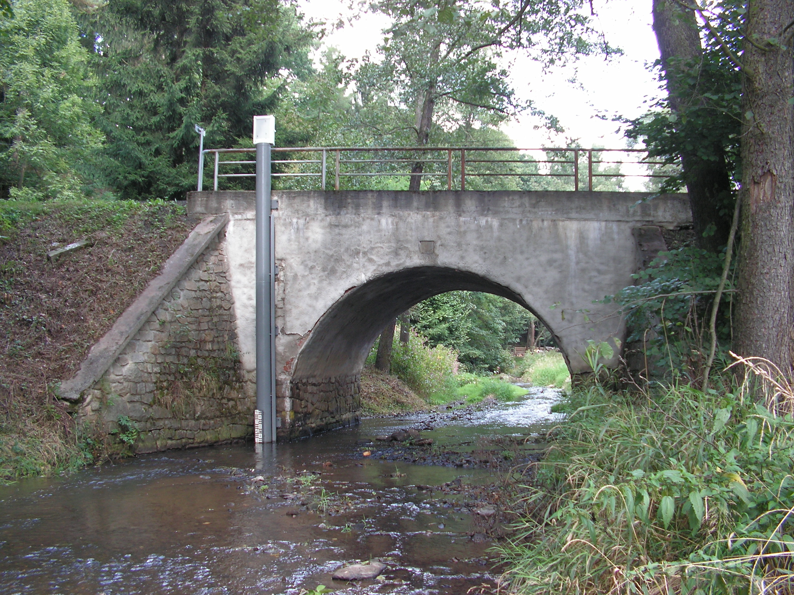 Říčka Sázavka u silničního mostu na říčním kilometru 2,30. Na snímku je vidět vodočet provozovaný ČHMÚ Praha.